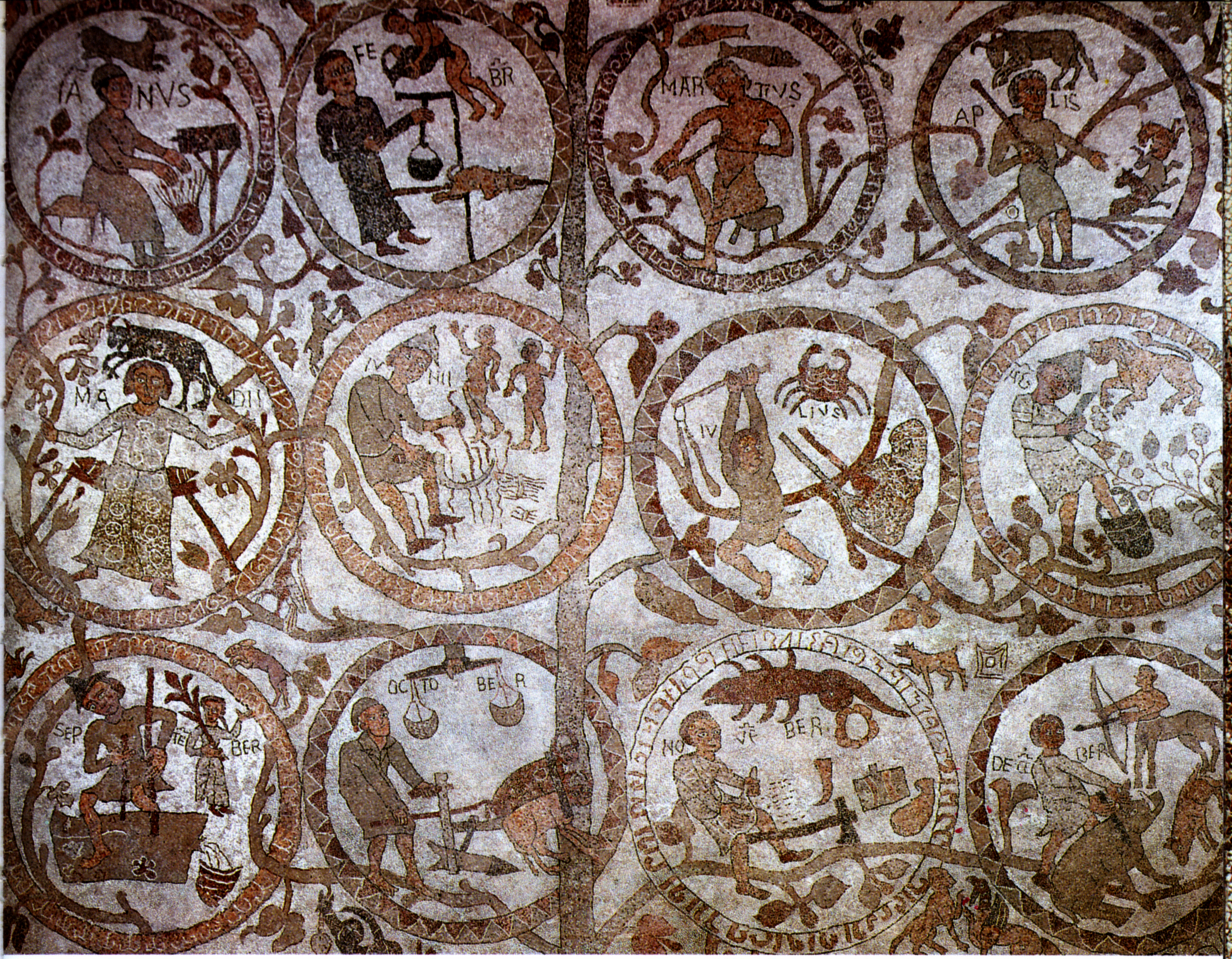 zodiaco nel duomo di Otranto